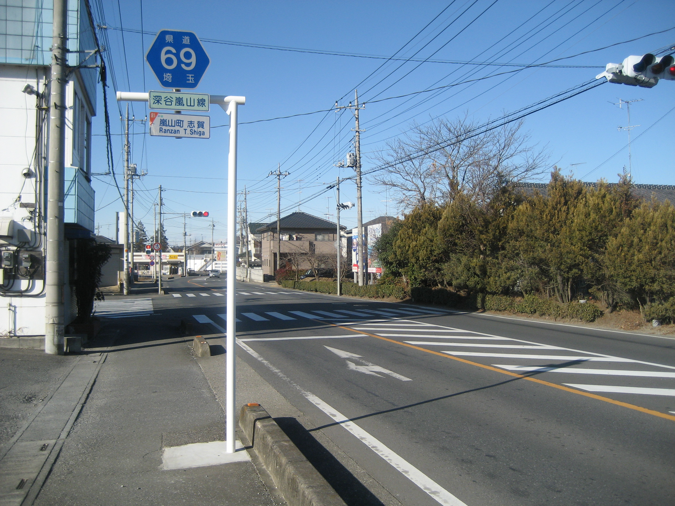 埼玉県道69号線嵐山町内